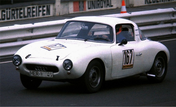 DKW Monza, Baujahr 1957